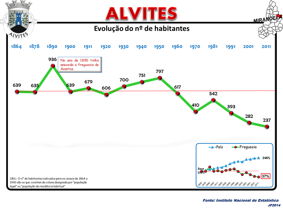 Evolução da População 1864 / 2011